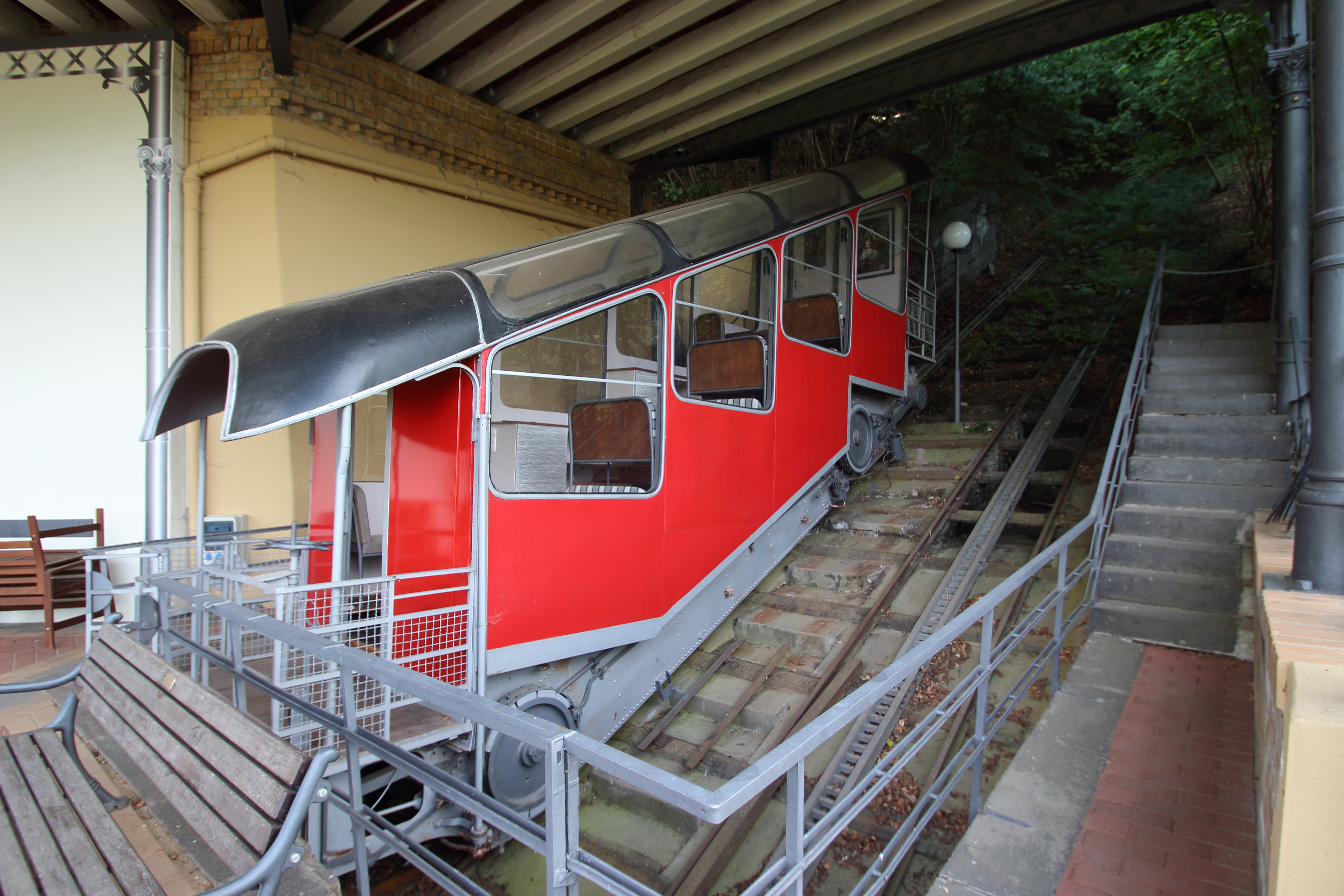 Renovierter Waggon in der Talstation der Malbergbahn Bad Ems